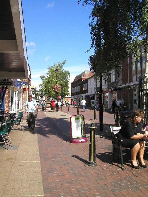 Bromsgrove